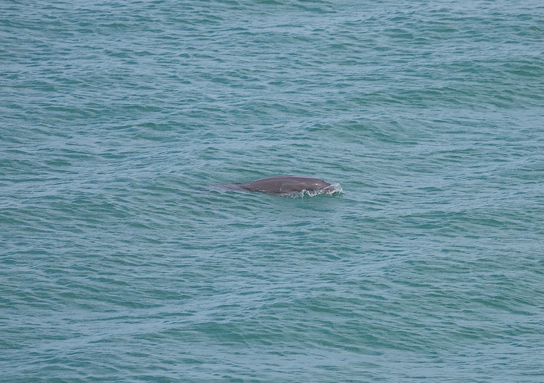 전라남도 임하도해역에서 상괭이 목격후 촬영